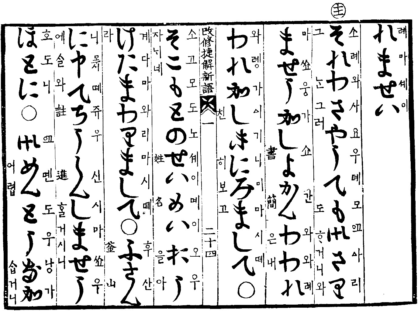 『改修捷解新語 本文・国語索引・解題』京都大学国語国文学会、1987年。をスキャン。